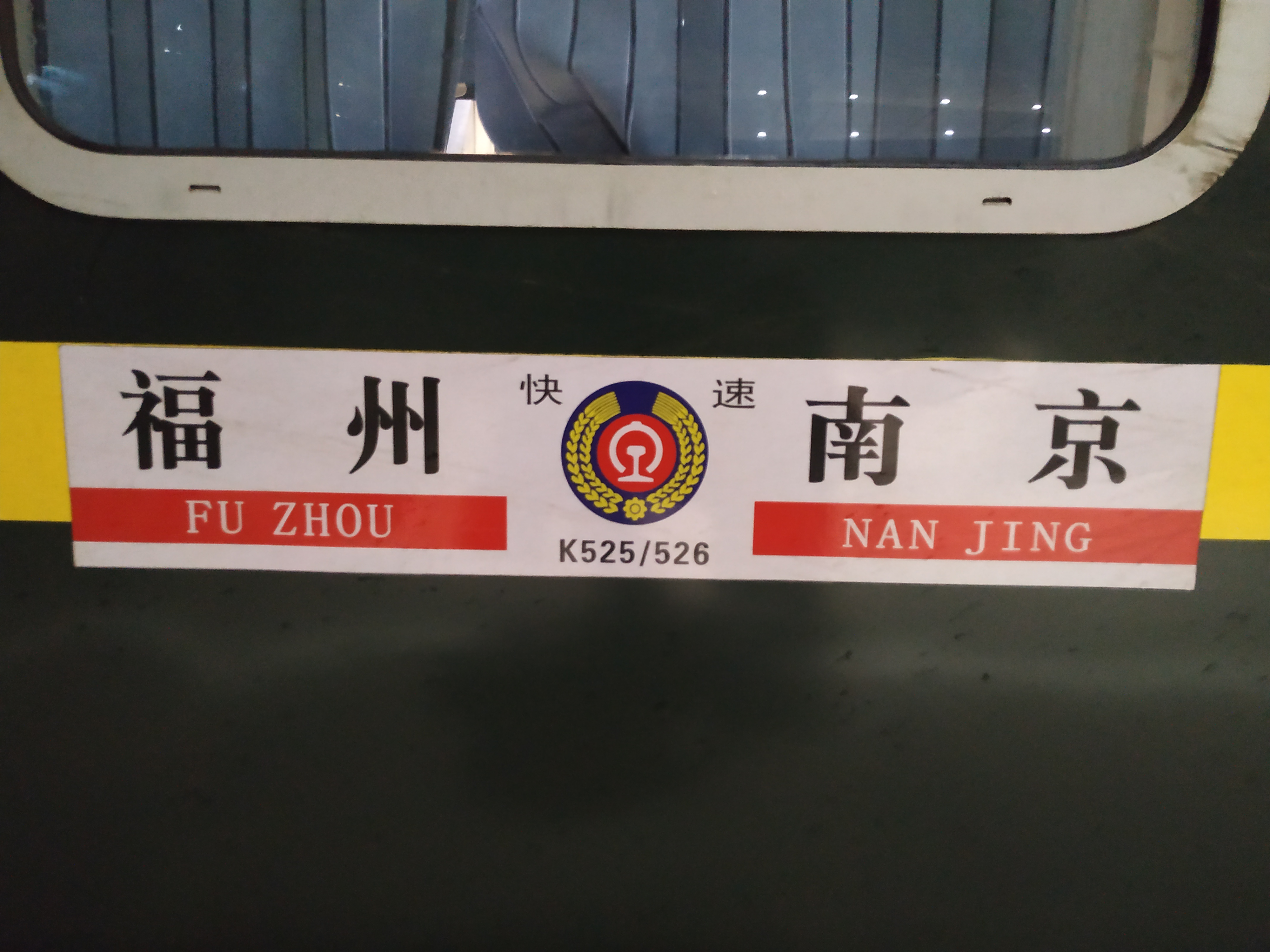 中文（中国大陆）: K525/526列车水牌